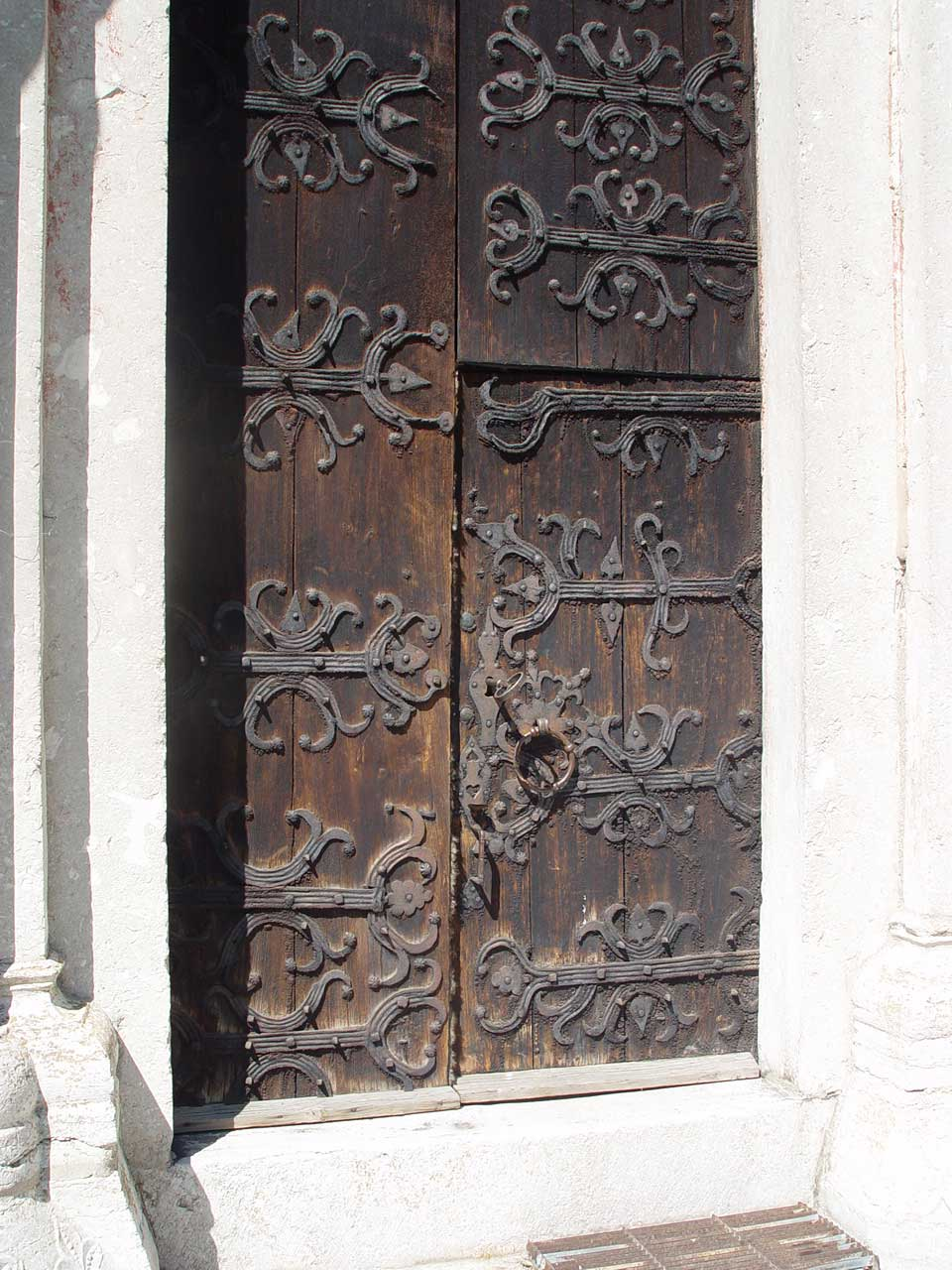 Bro kyrka (Gotland).Tür Seitenportal